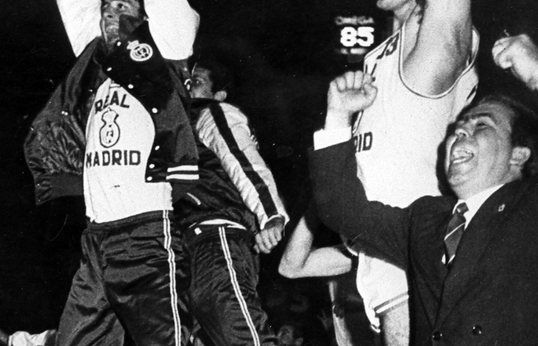 Pedro Ferrandiz